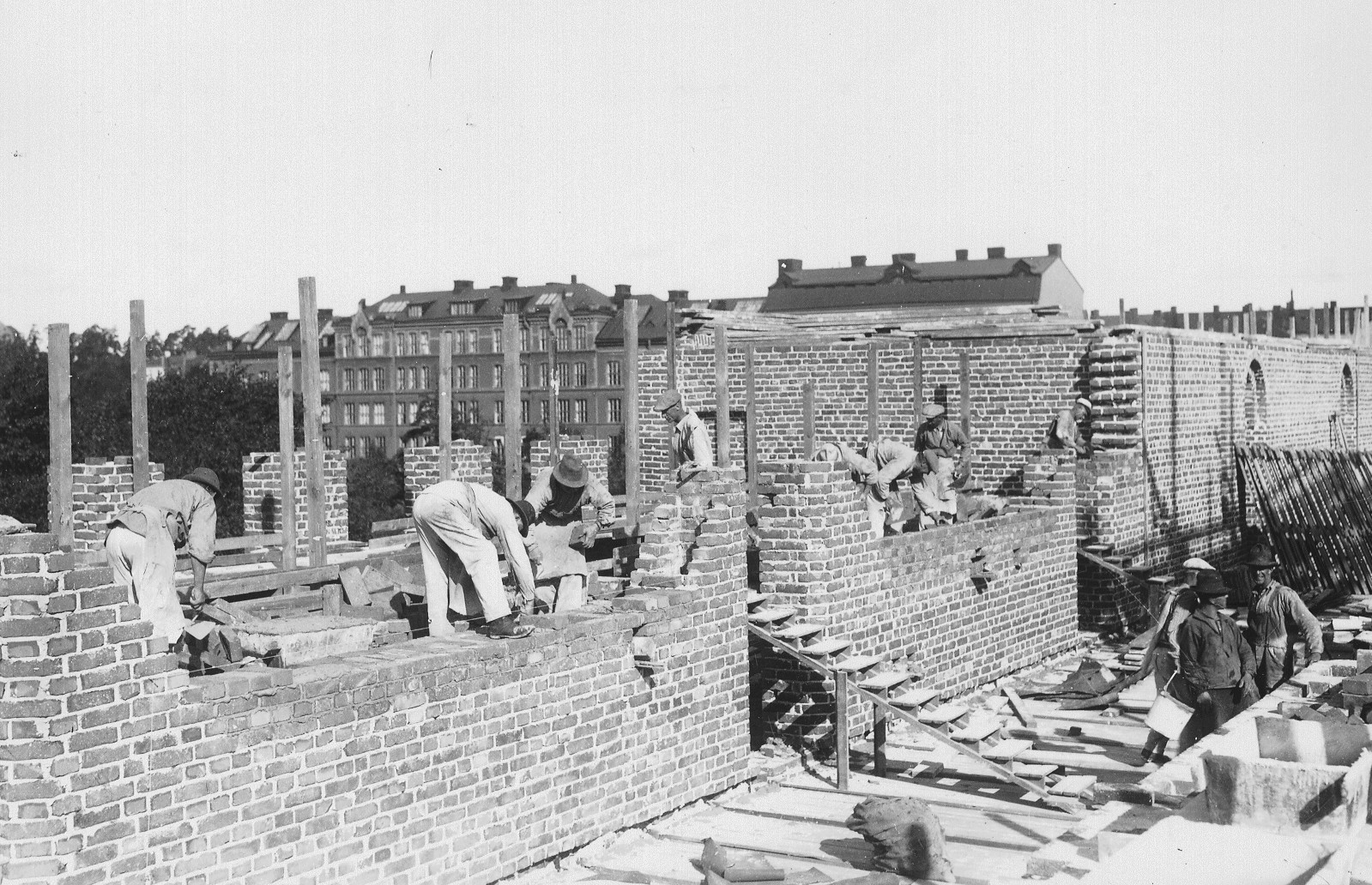 Fridhemsplans gymnasium (dåvarande "Norra kommunala mellanskolan") under uppförande, arkitekt Georg A. Nilsson